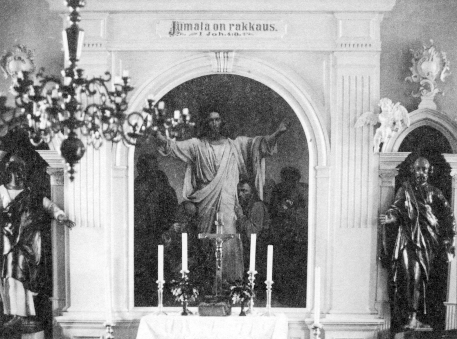 Narva Püha Miikaeli kirik